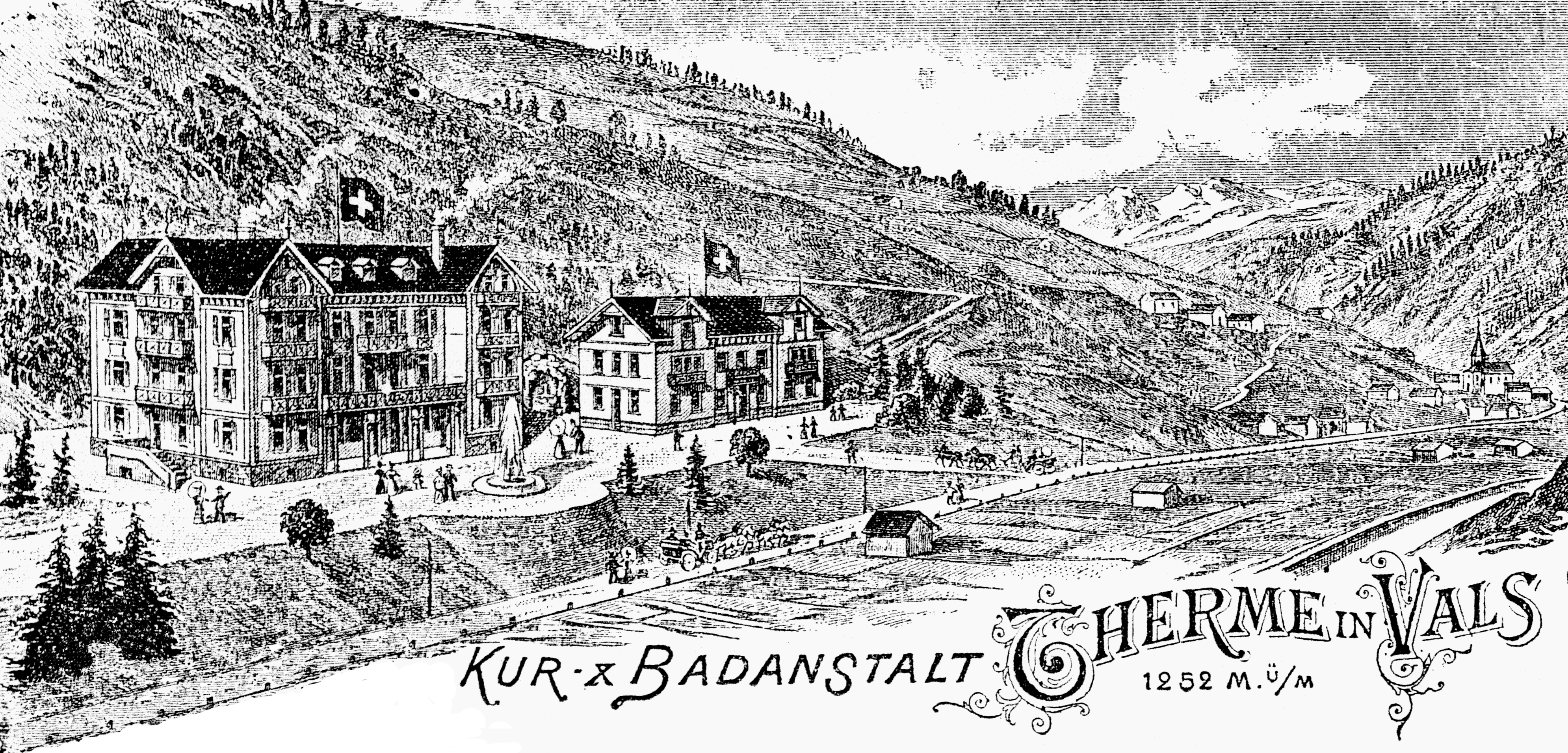 Kur- & Badeanstalt Therme in Vals / Bild wurde bearbeitet und entspricht daher nicht zu 100% dem Originalbild.